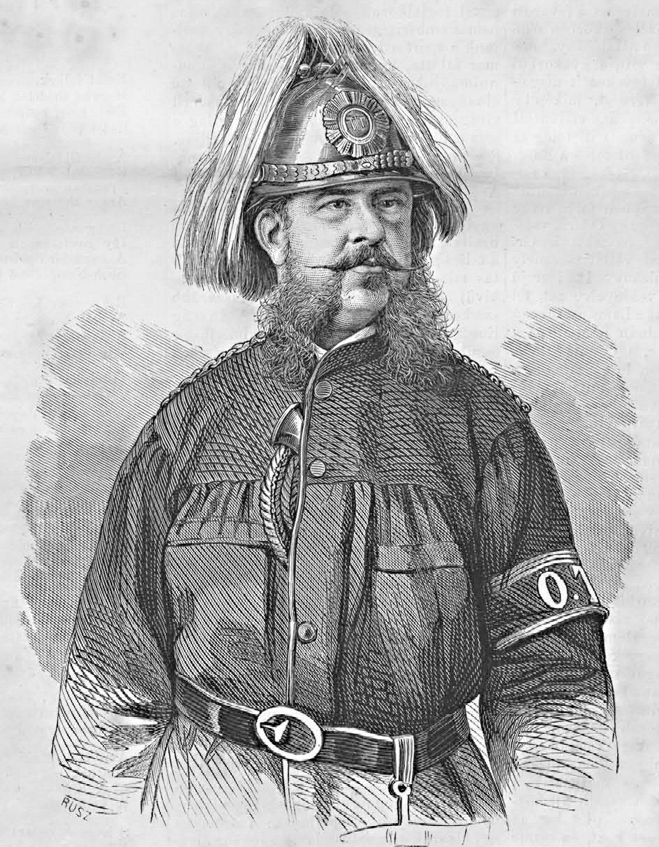 gróf Széchenyi Ödön (1839–1922). Rusz Károly metszete (Vasárnapi Ujság, 1871. szeptember 17.)